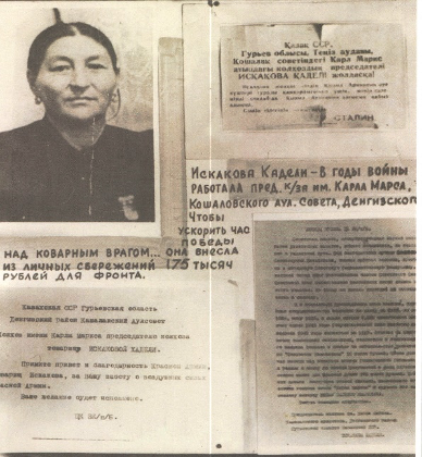 Kadeli Iskakova